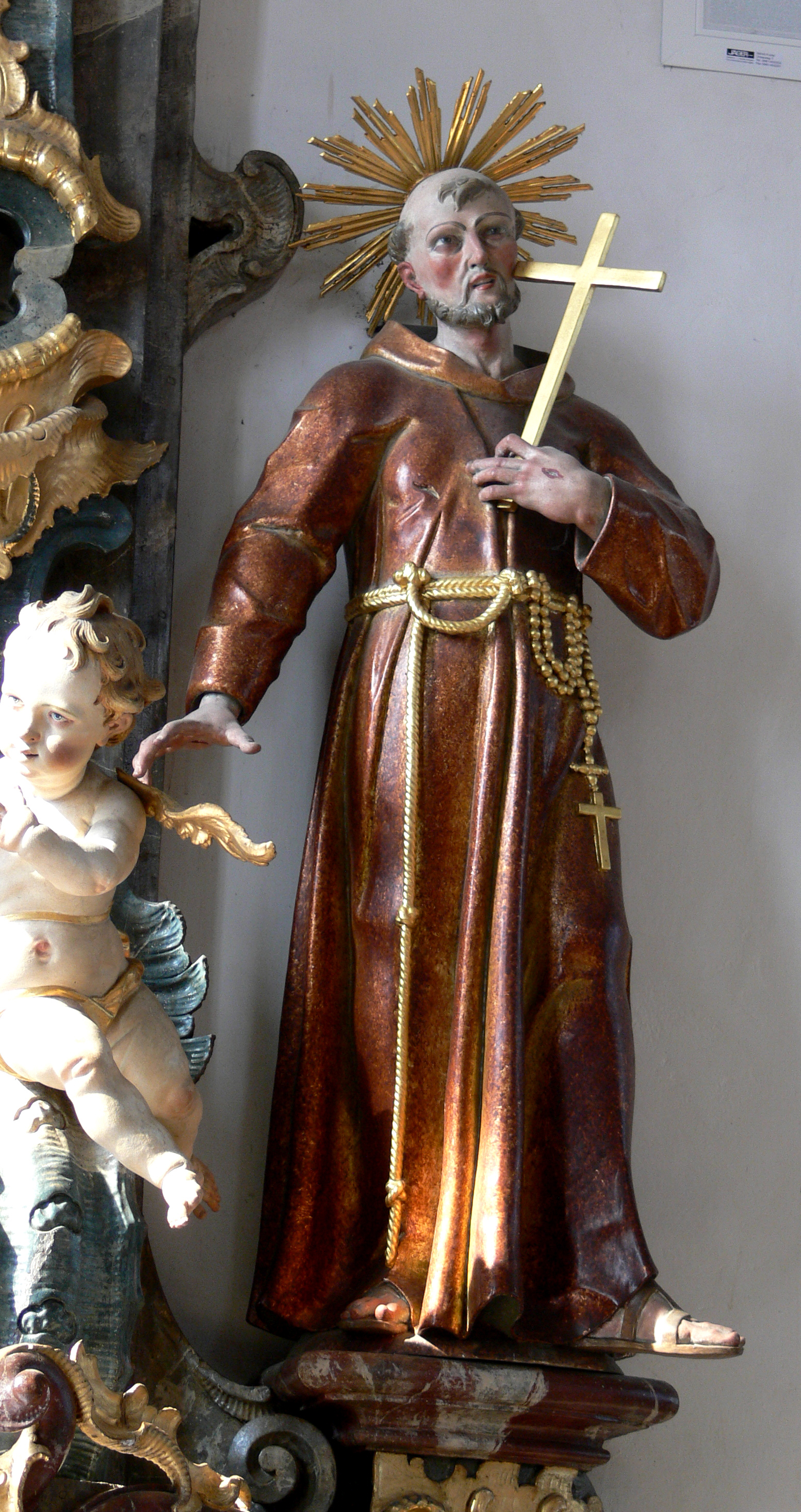 Wallfahrtskirche Maria zum Berge Karmel, Baitenhausen, Stadt Meersburg, Bodenseekreis Josefsaltar von Johann Michael Hegenauer, 1764/1765 Figur "Hl. Franz von Assisi"